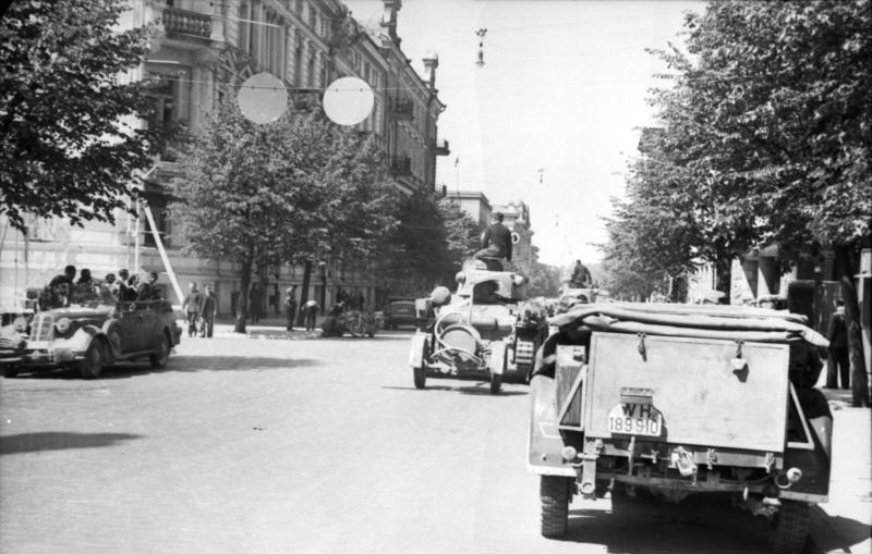 Deutsche Truppen rücken in Wilna ein. Juni 1941 PK-Aufnahme: Moosdorf